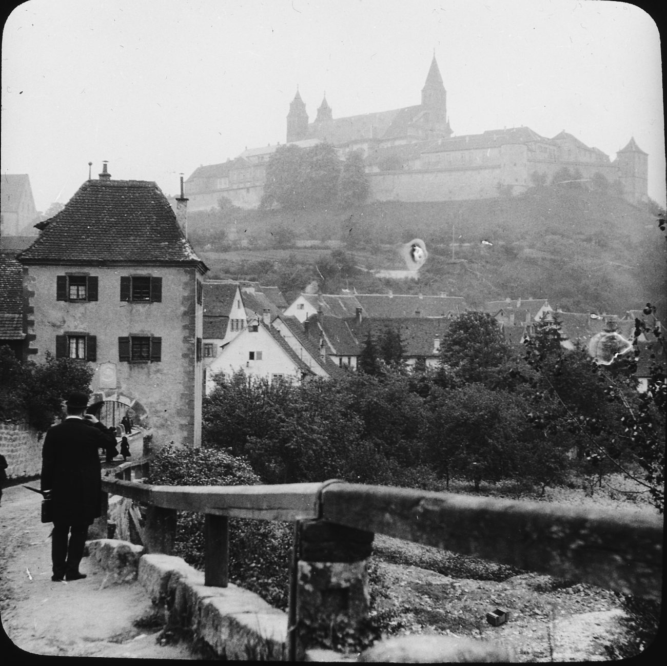 SKC2979 Schwäbische Hall med Schloss Kronburg i bakgrunden, 1911. Schwäbische Hall with Schloss Kronburg, 1911. Photo: Sigurd Curman